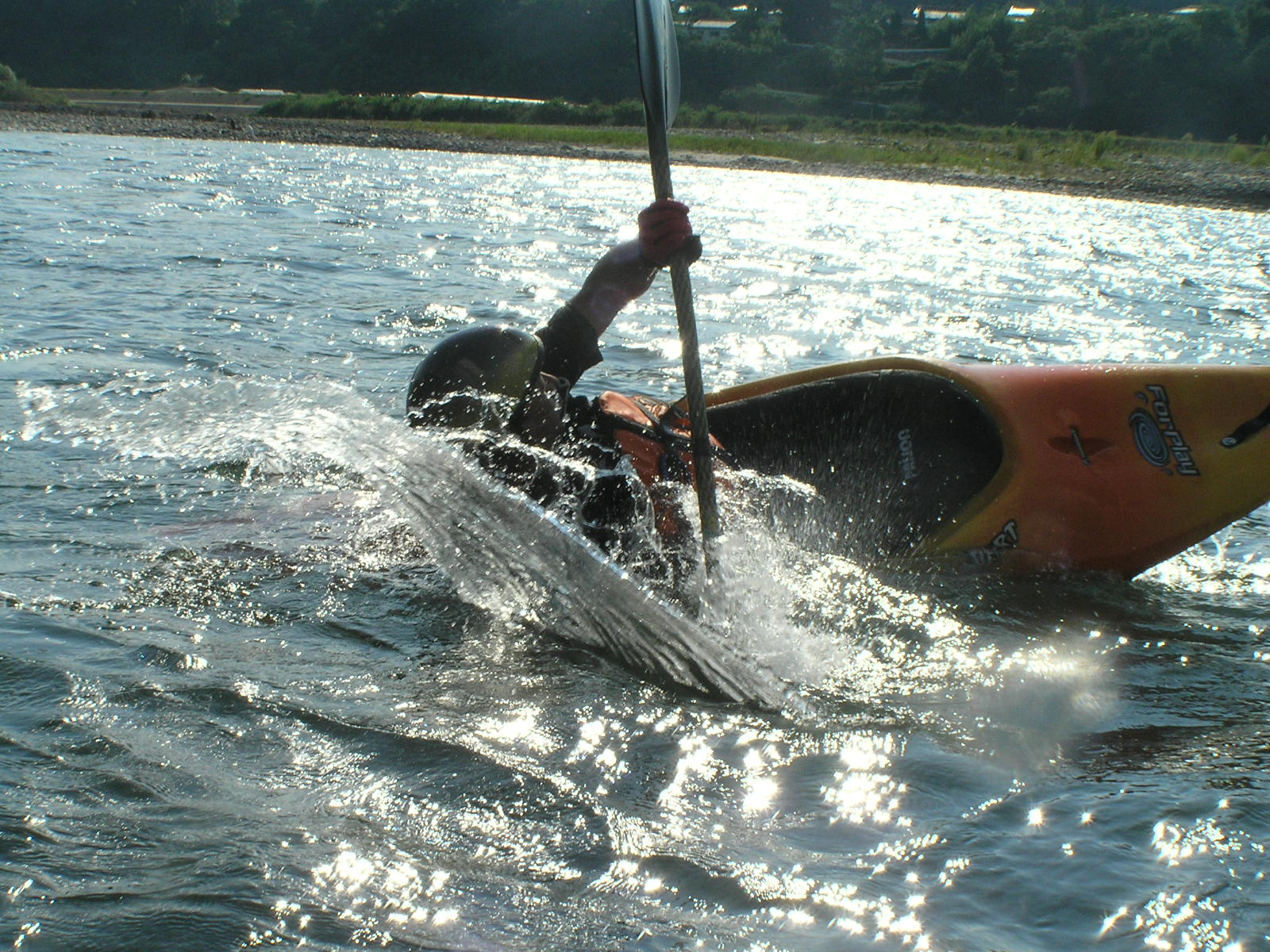 2007-08-13 Sai-River Canoe touring 犀川カヌーツーリング（カヤック壇上晴一）